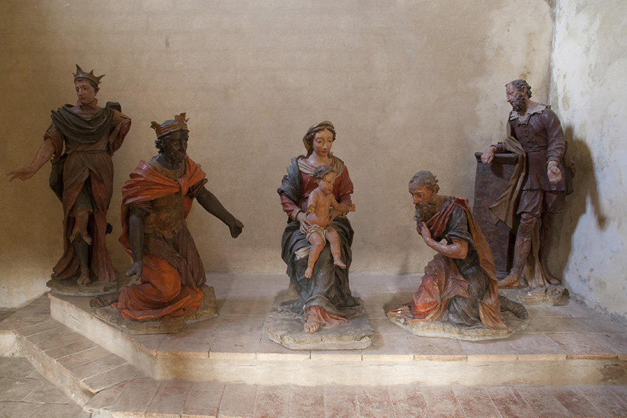 Gruppo statuario dell'adorazione dei re Magi in terracotta policroma, al santuario della SS. Trinità a Casnigo.